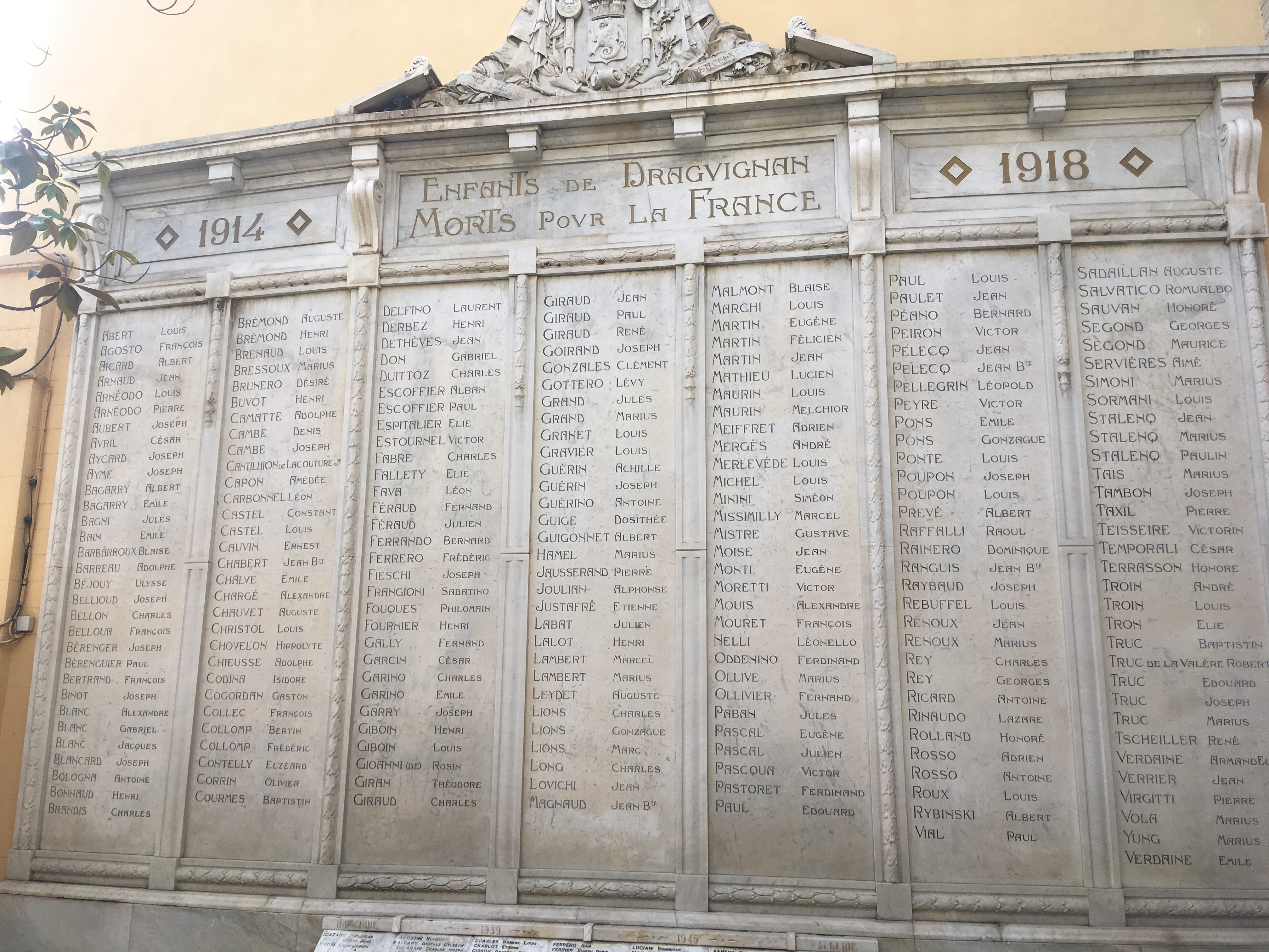 Monument première Guerre mondiale dans la cour de la mairie à Draguignan F-83300